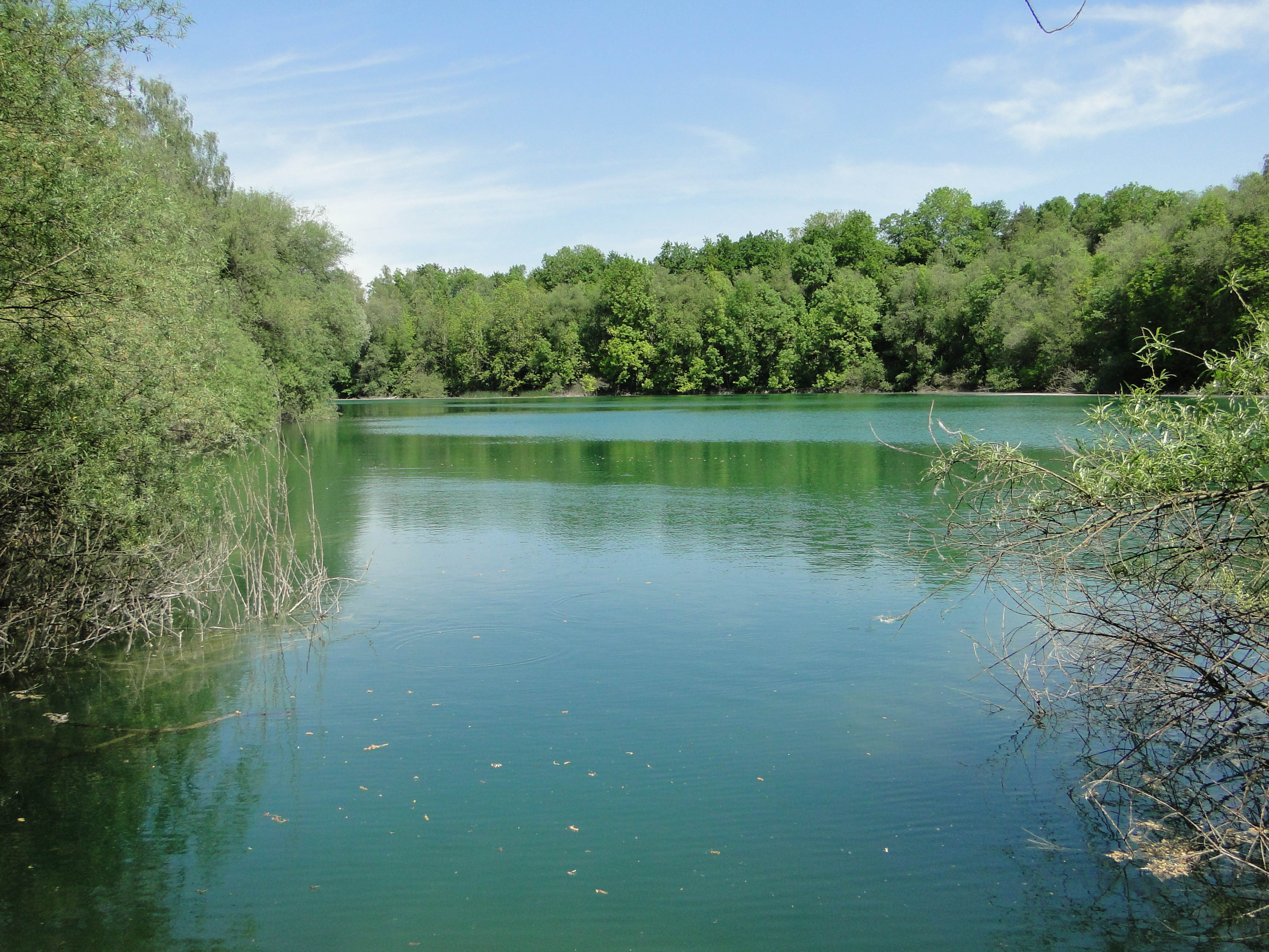 Blick von Süden nach Norden über den nördlichen Baggersee, Naturschutzgebiet Kiesgrube Aitrach